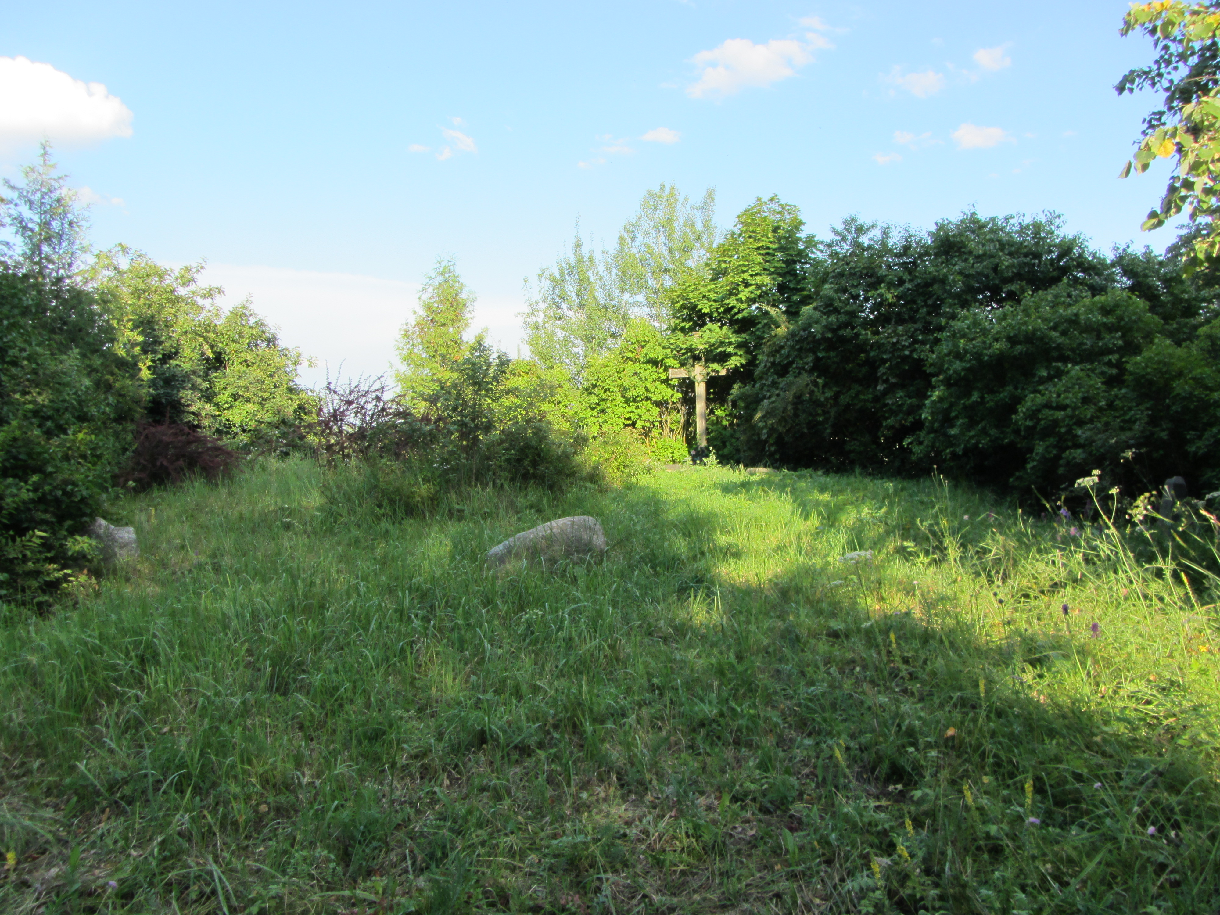 Беларуская (тарашкевіца): Сямейнае пахаваньне Ельскіх ва ўрочышчы Кобань, побач з Дудзічамі.